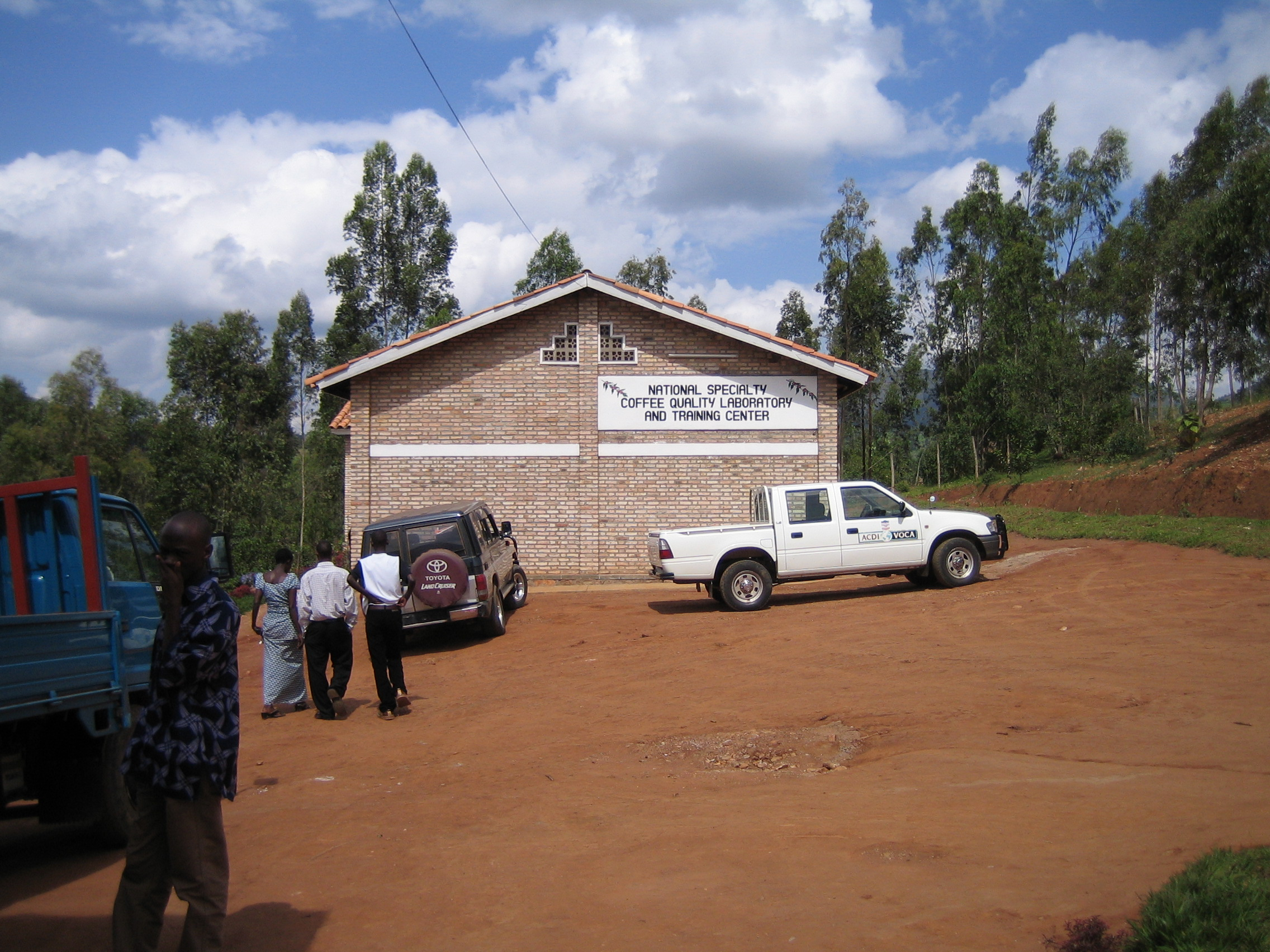 taken by SteveRwanda